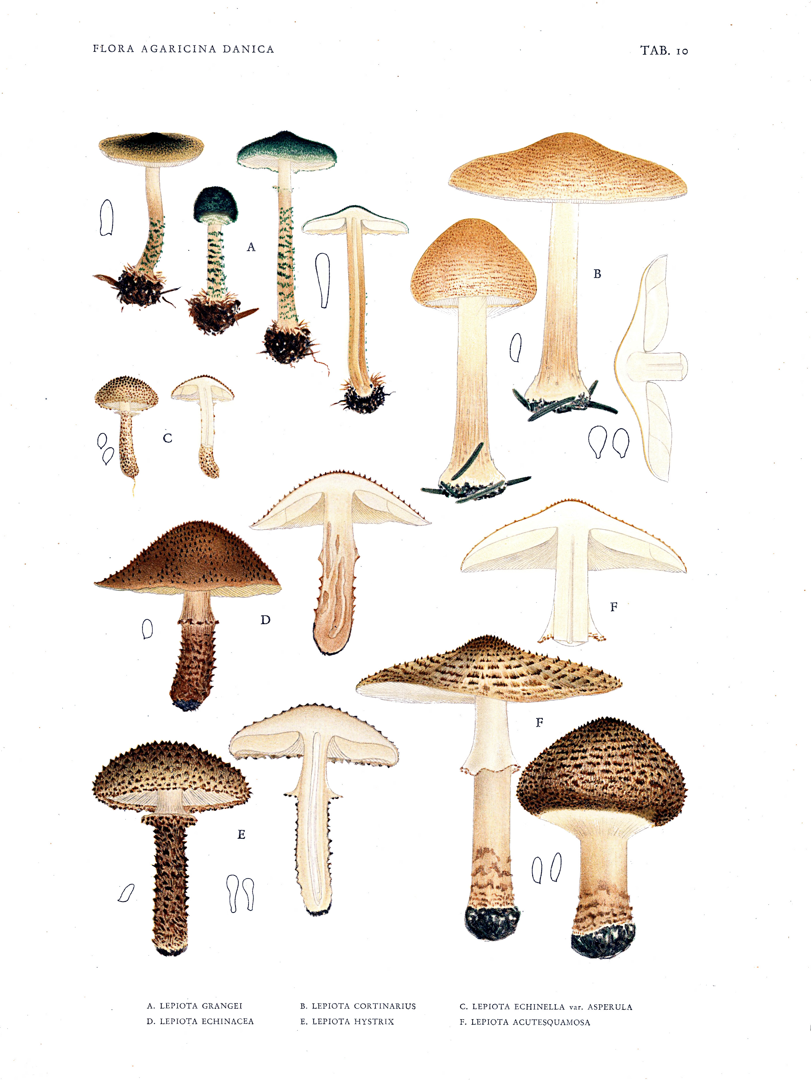 Jakob E. Lange: Flora agaricina Danica. Vol. 1; TAB. 10 A. Lepiota grangei B. Lepiota cortinarius C. Lepiota echinella var. asperula D. Lepiota echinacea E. Lepiota hystrix F. Echinoderma asperum as Lepiota acutesquamosa